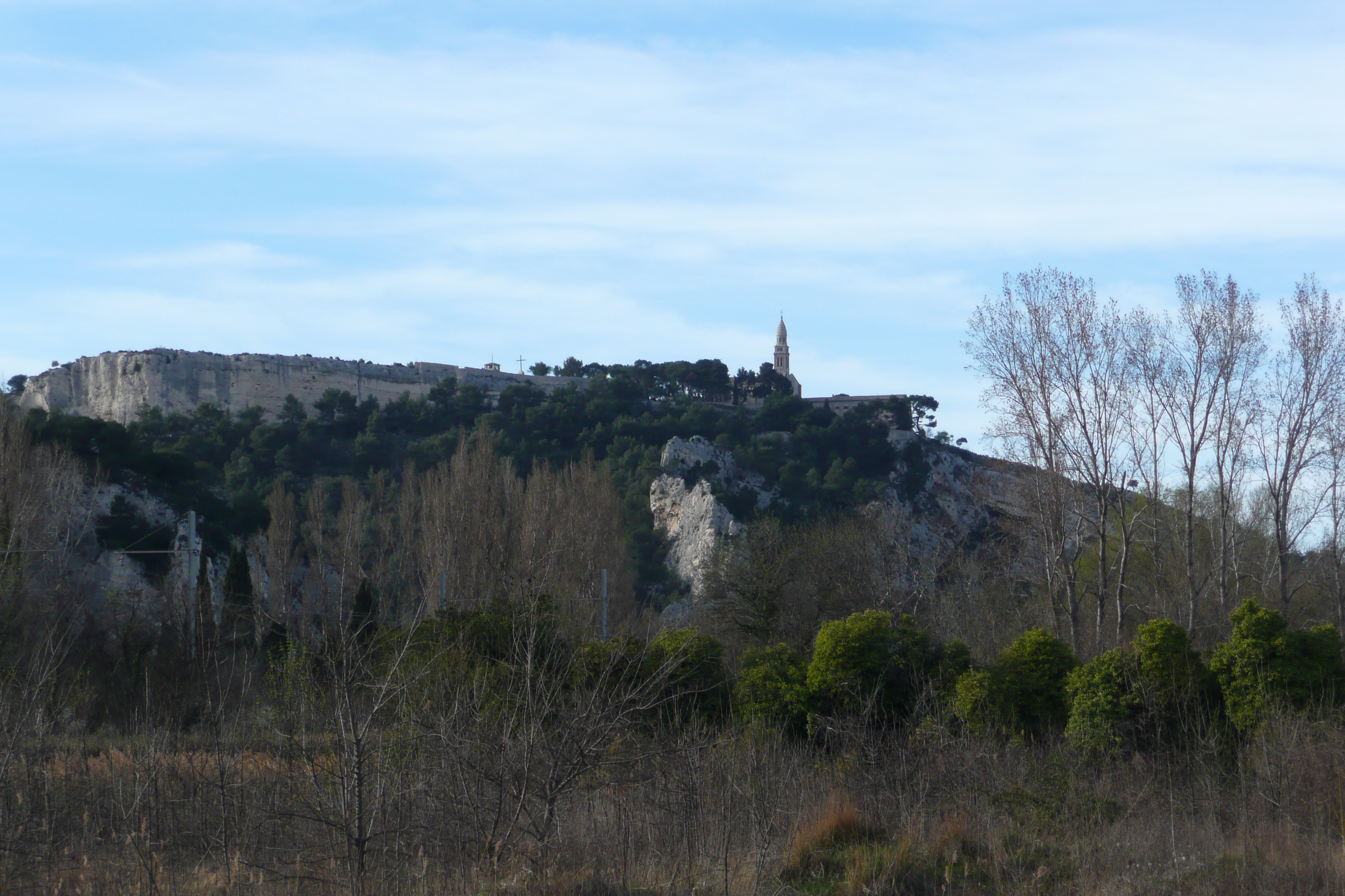 À environ 2 km avant l'entrée d'Orgon